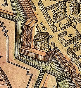 Lage des alten Cadetten-Hauses in Berlin 1737.